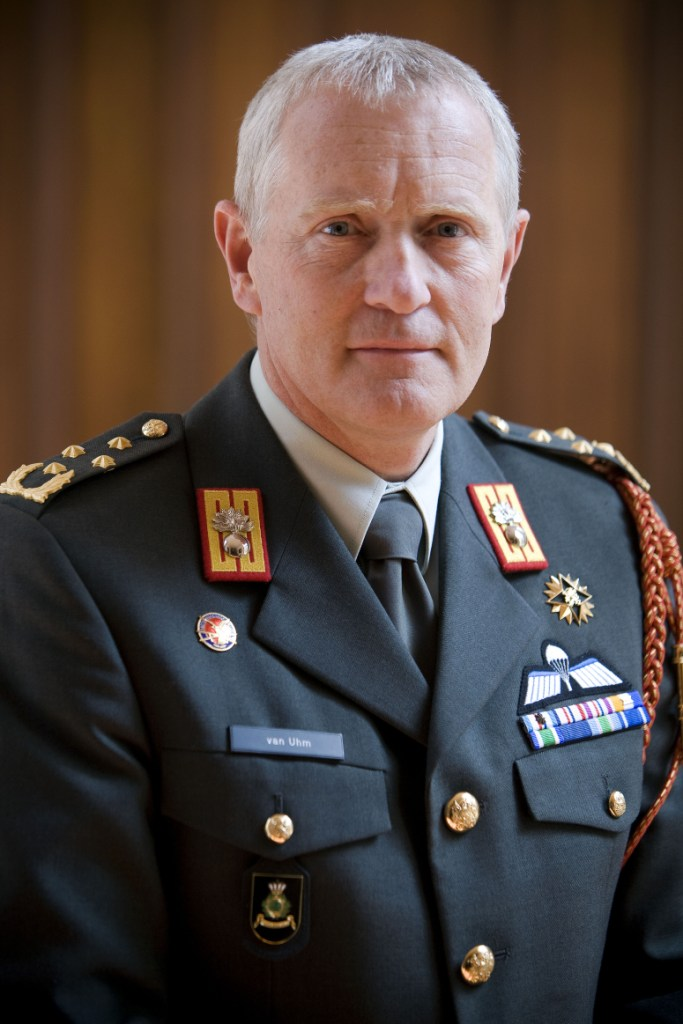 Commandant der Strijdkrachten generaal Peter van Uhm